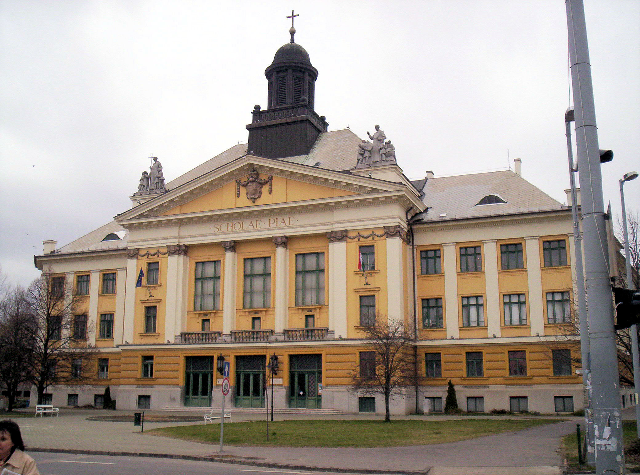 A kecskeméti Piarista Iskola. Alapította Koháry István országbíró 1717-ben. A mai épületet Hültl Dezső tervezte, épült 1930 és 1934 között. – photo taken by uploader User:Csanády in 2007.